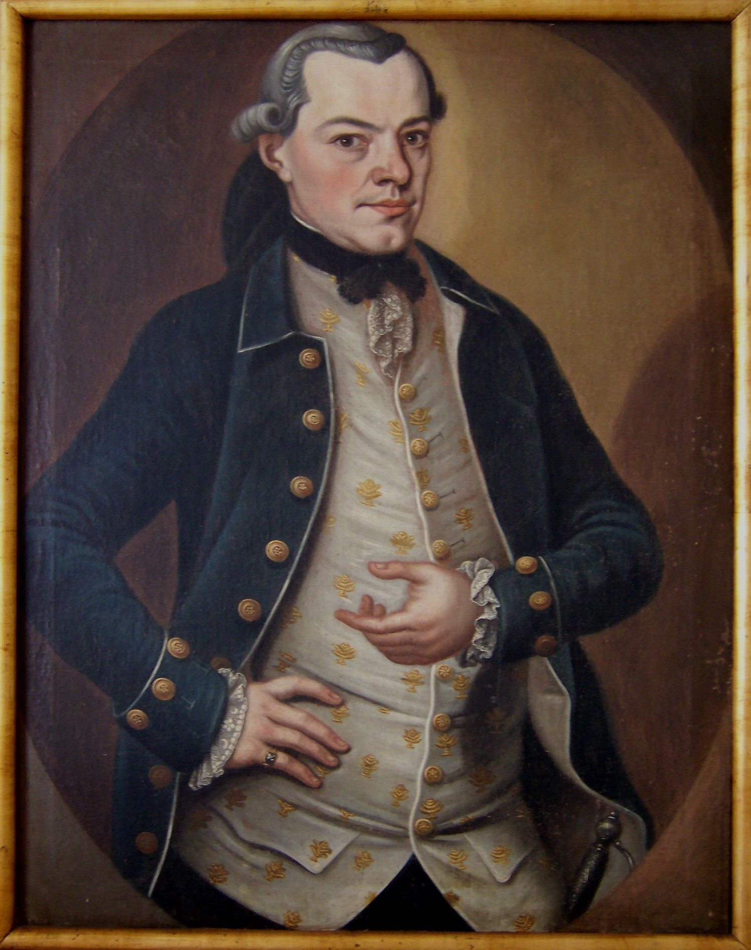 Matthias Naeff (1744-1790), Statthalter in Altstätten, Vater von Johann Matthias Naeff-Dalp